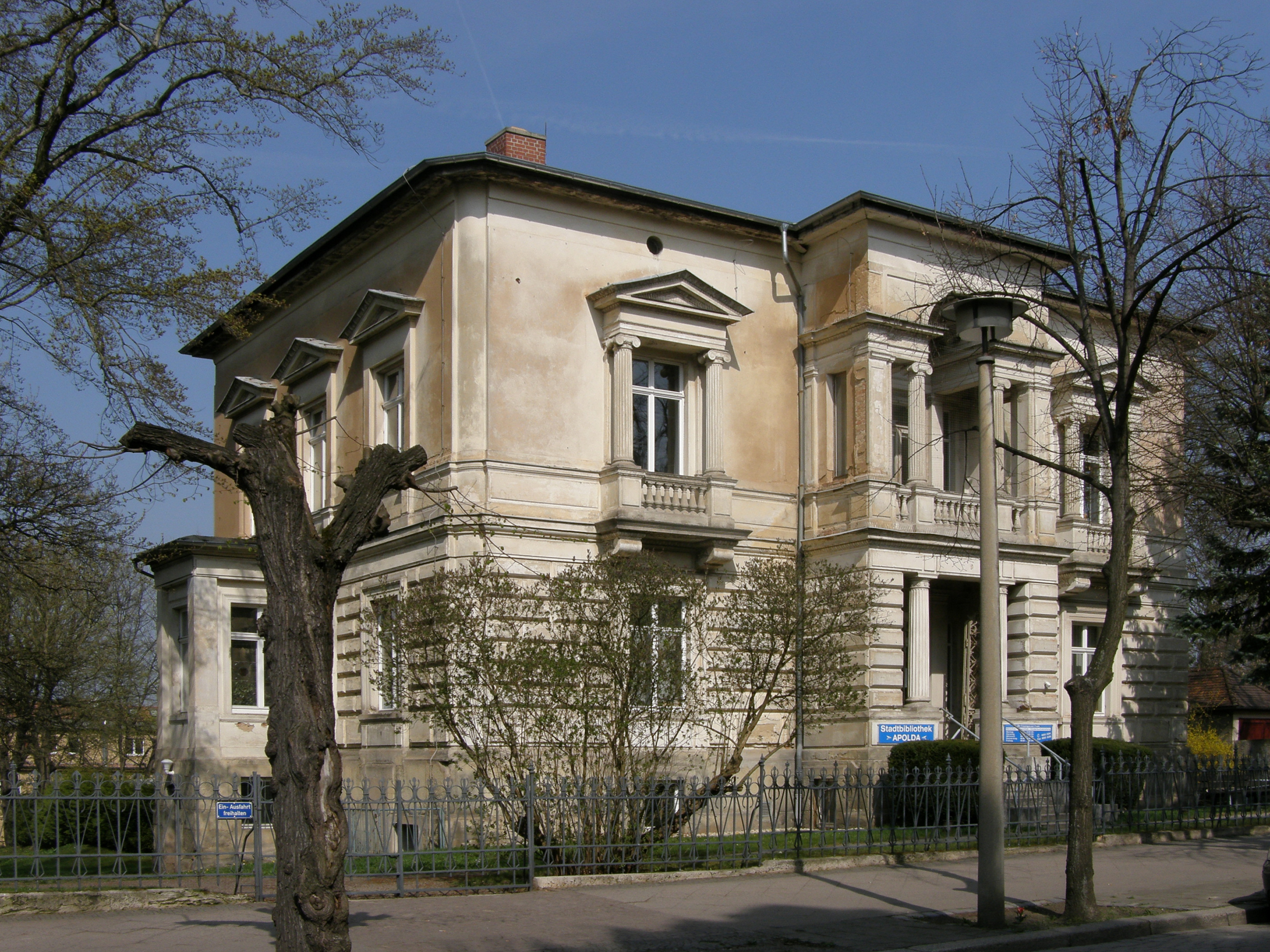 Stadt Apolda - Stadtbibliothek an der Bahnhofsstraße